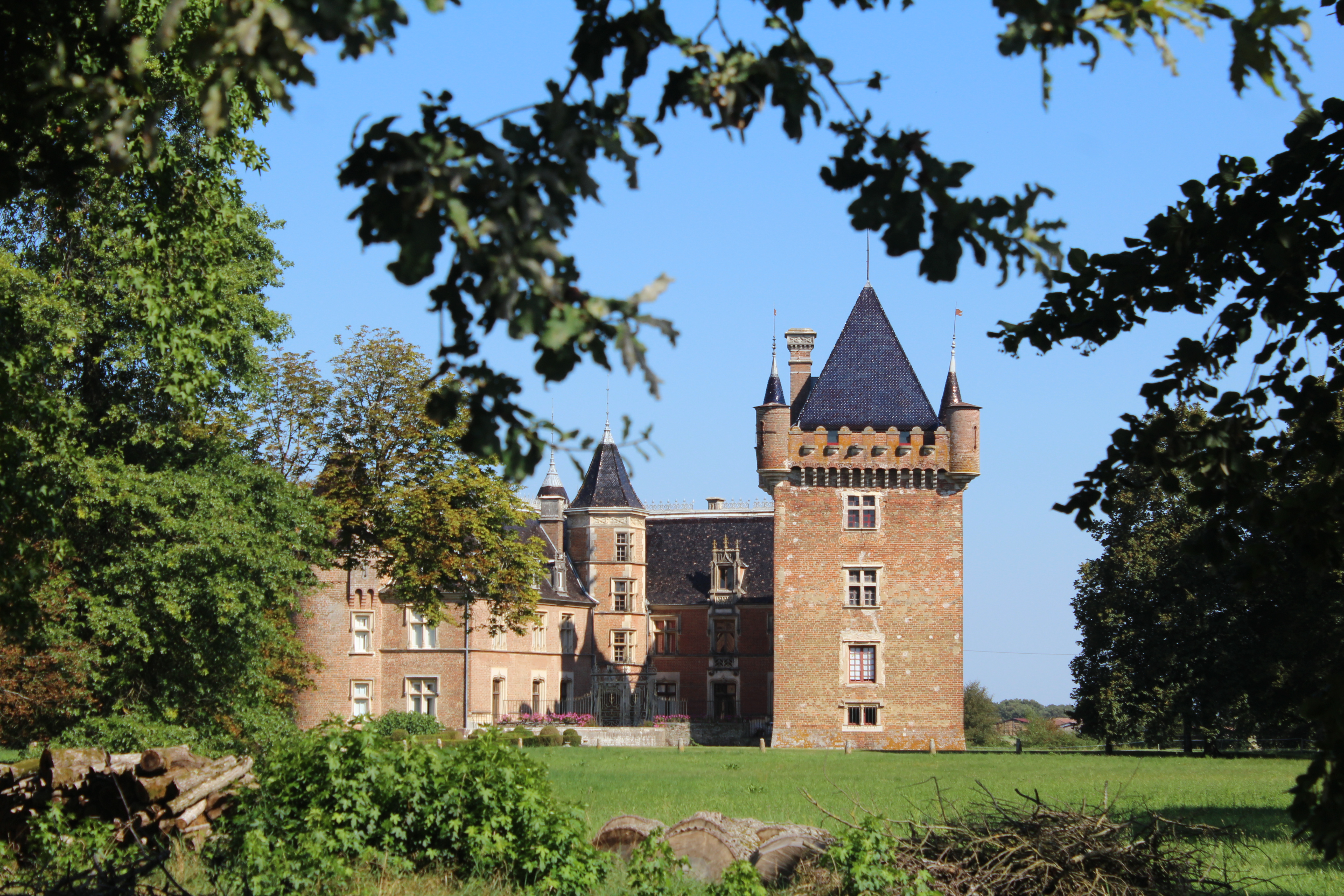 Château de Loriol à Confrançon.